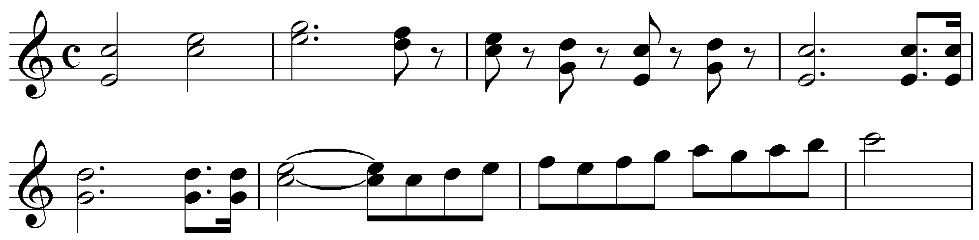 Beginn des Finales der Fünften Symphonie von Beethoven